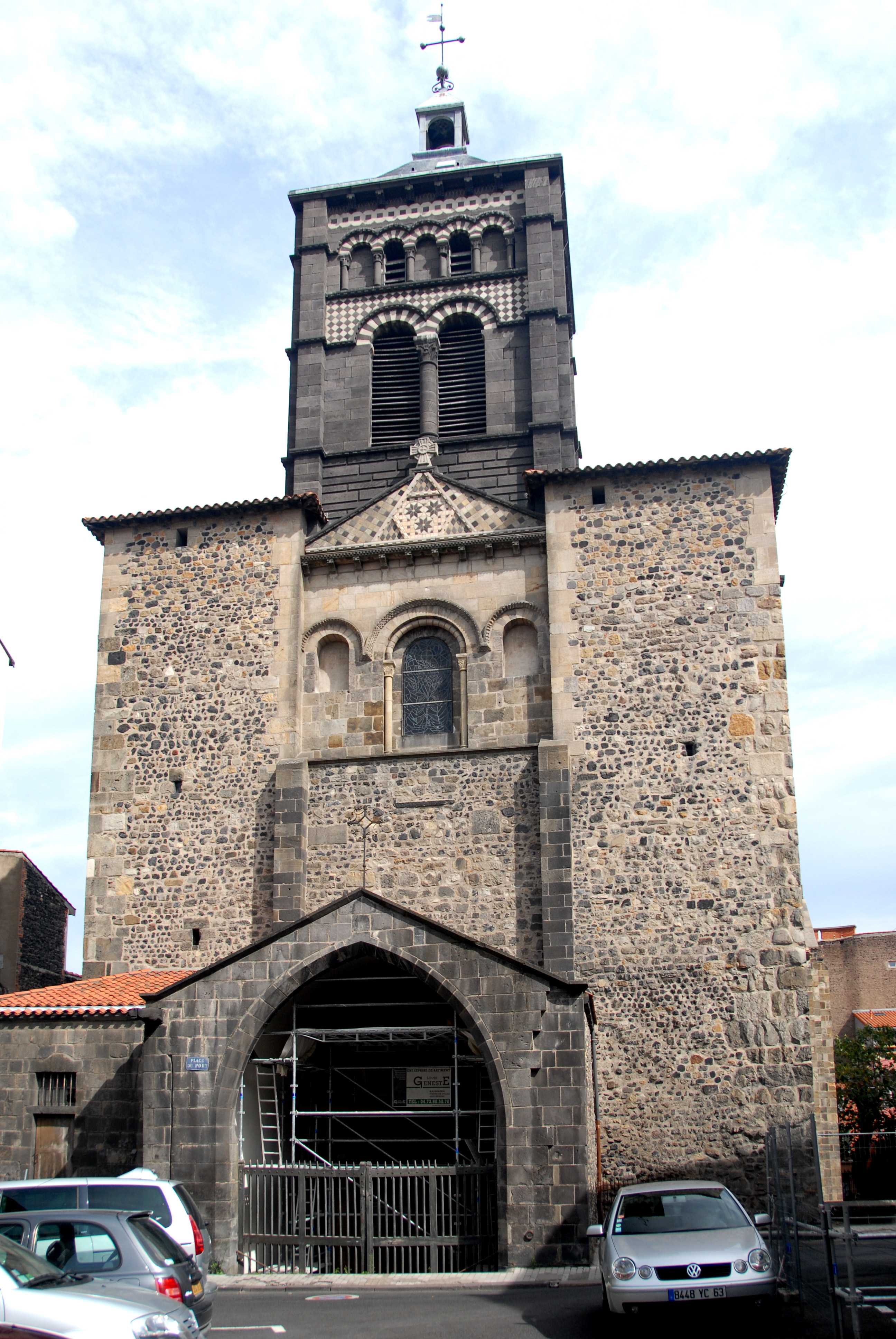 Noter-Dame du port, Westwerk, "Fassade"